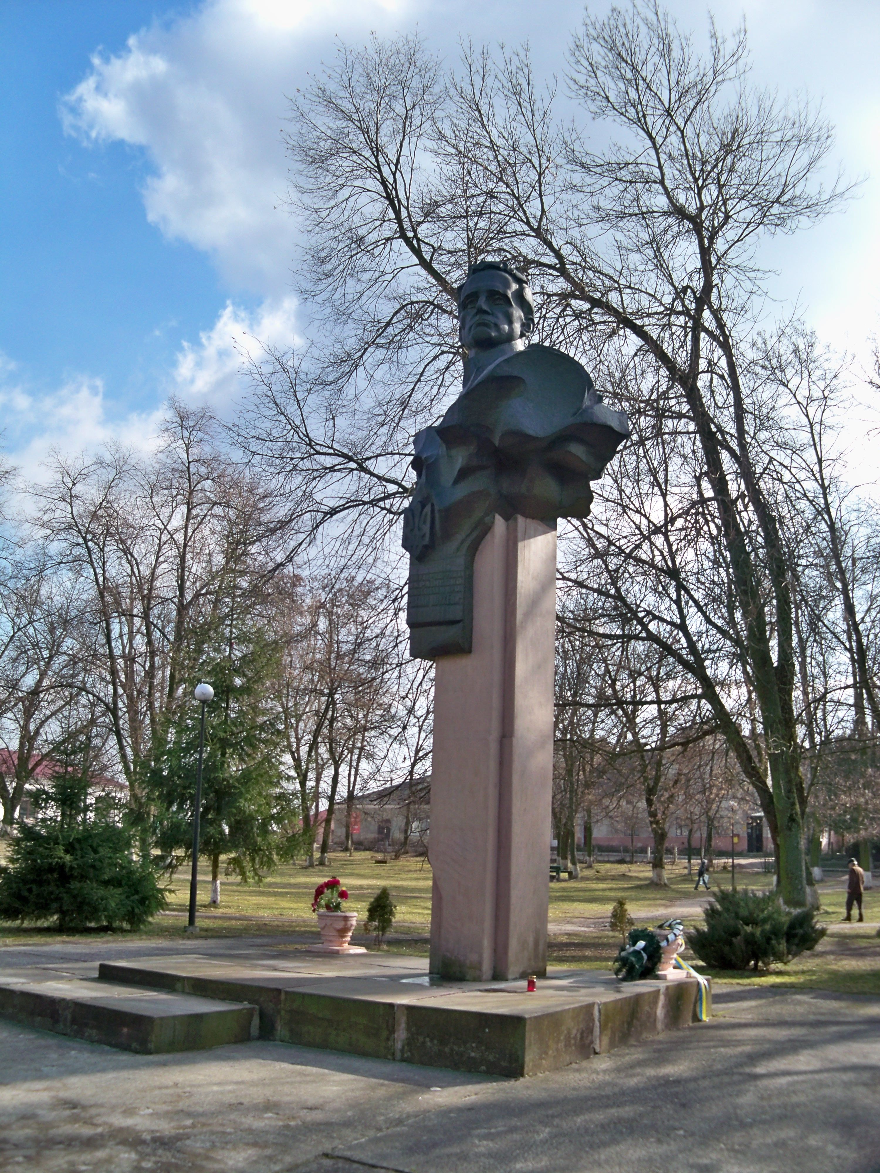 Пам'ятник Шухевичу Р. (Т.Чупринці), головнокомандувачу УПА, генералу (ск. П.Штаєр, арх. В.Блюсюк, Л.Новосілець, 1996, бронза, мармурова крихта), смт Краковець